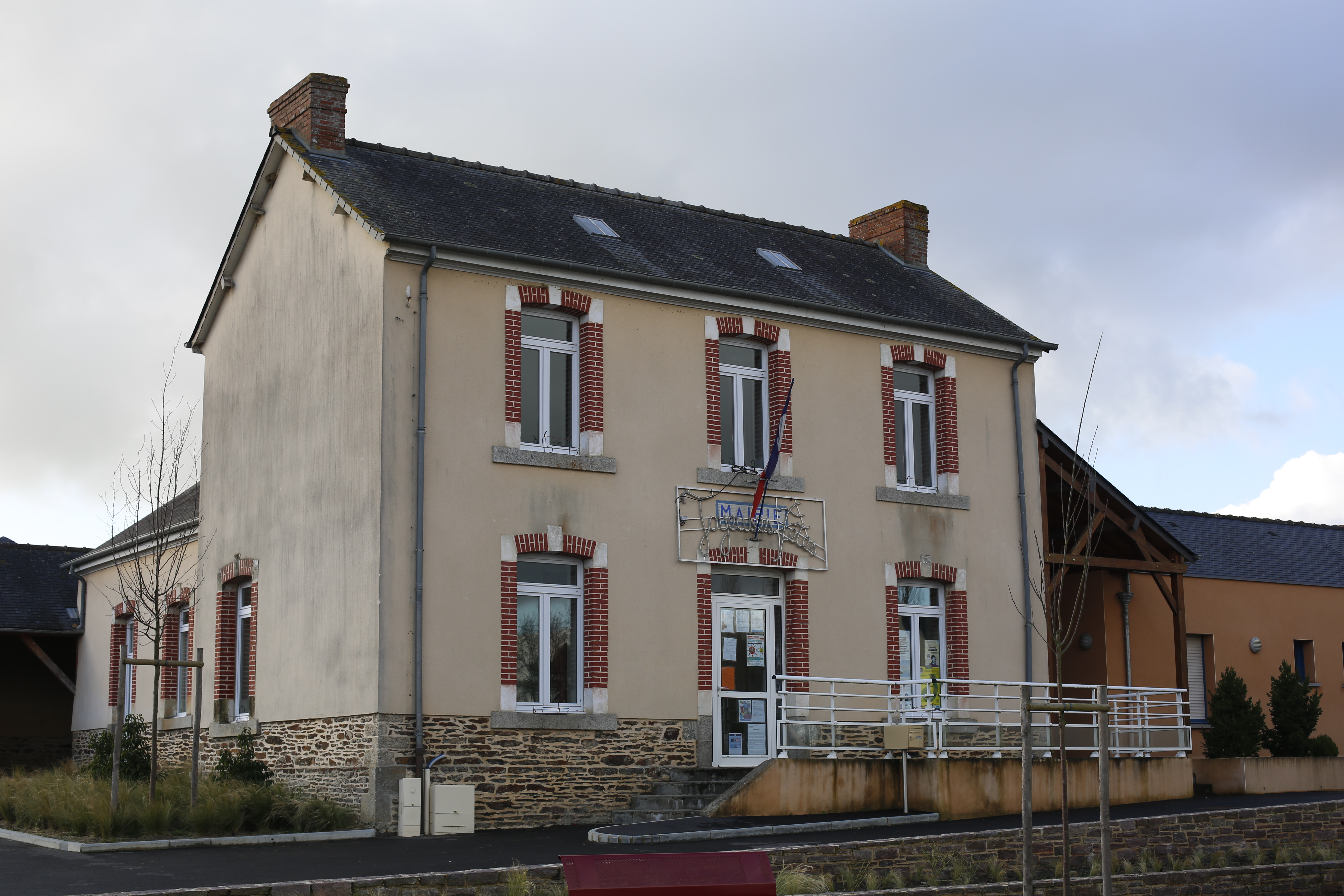 Mairie de Saint-M'Hervon.